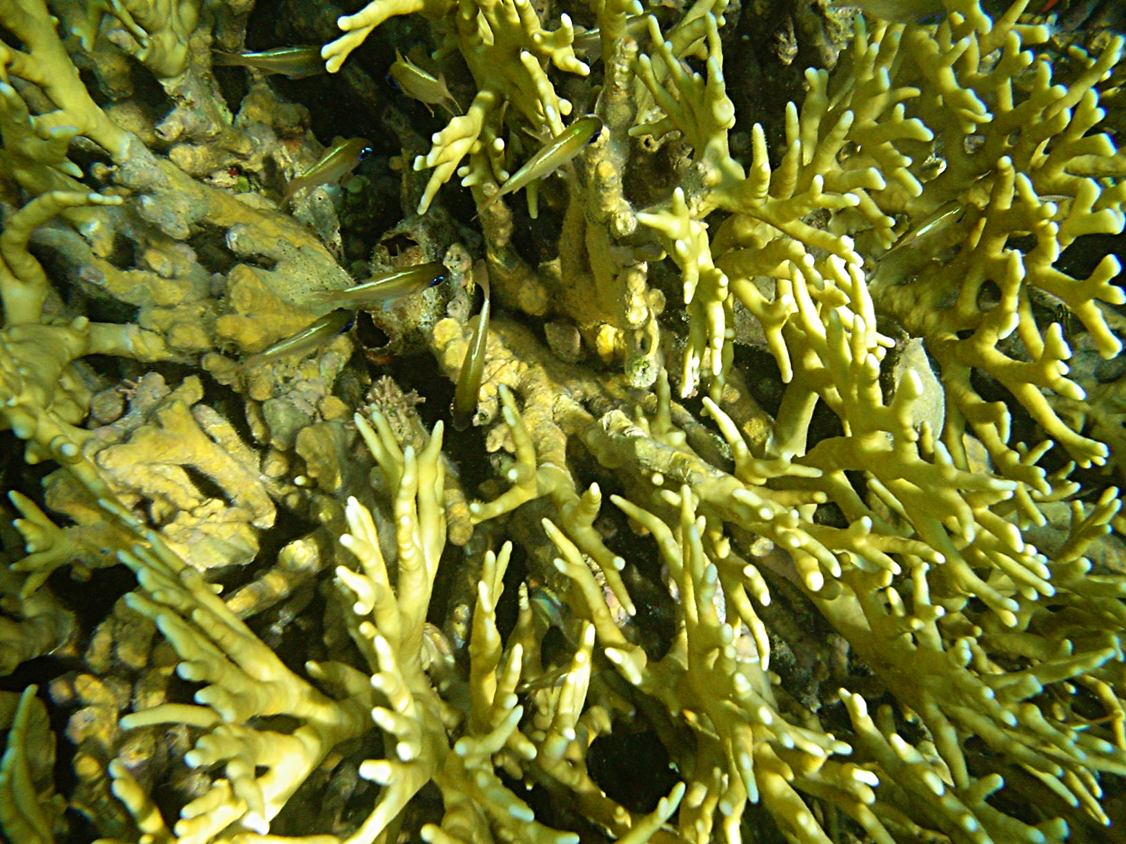 Fire Corals at Fiji